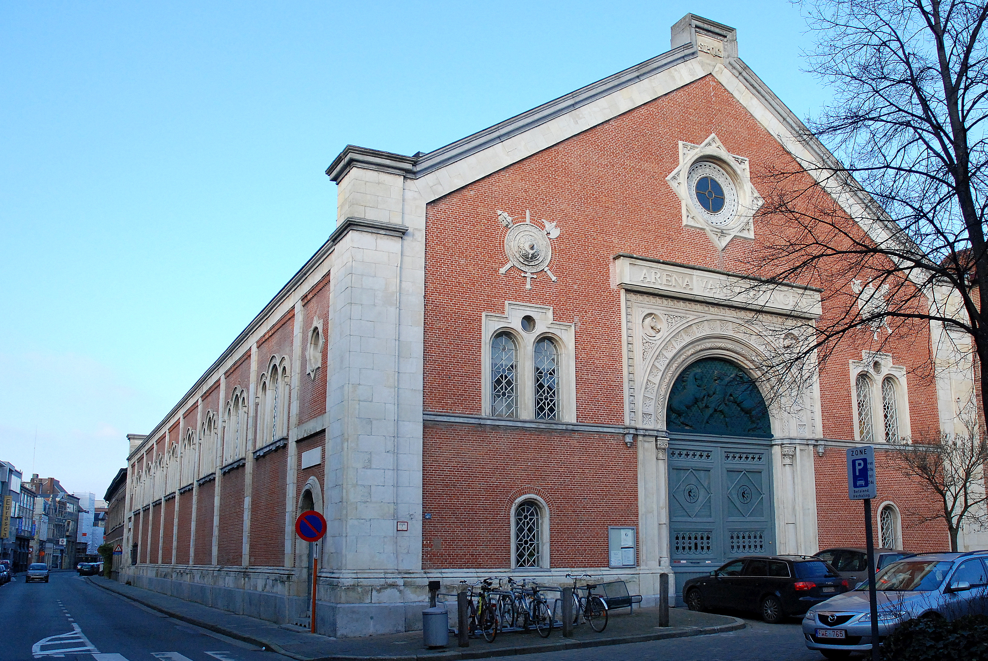 Arena van Vletingen te Gent, België (voormalige militaire ruiterijschool, tegenwoordig zaal voor ritmische gymnastiek).